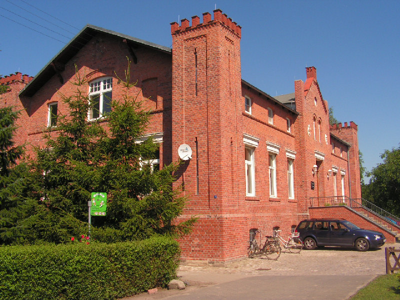 Schloss Bertkow